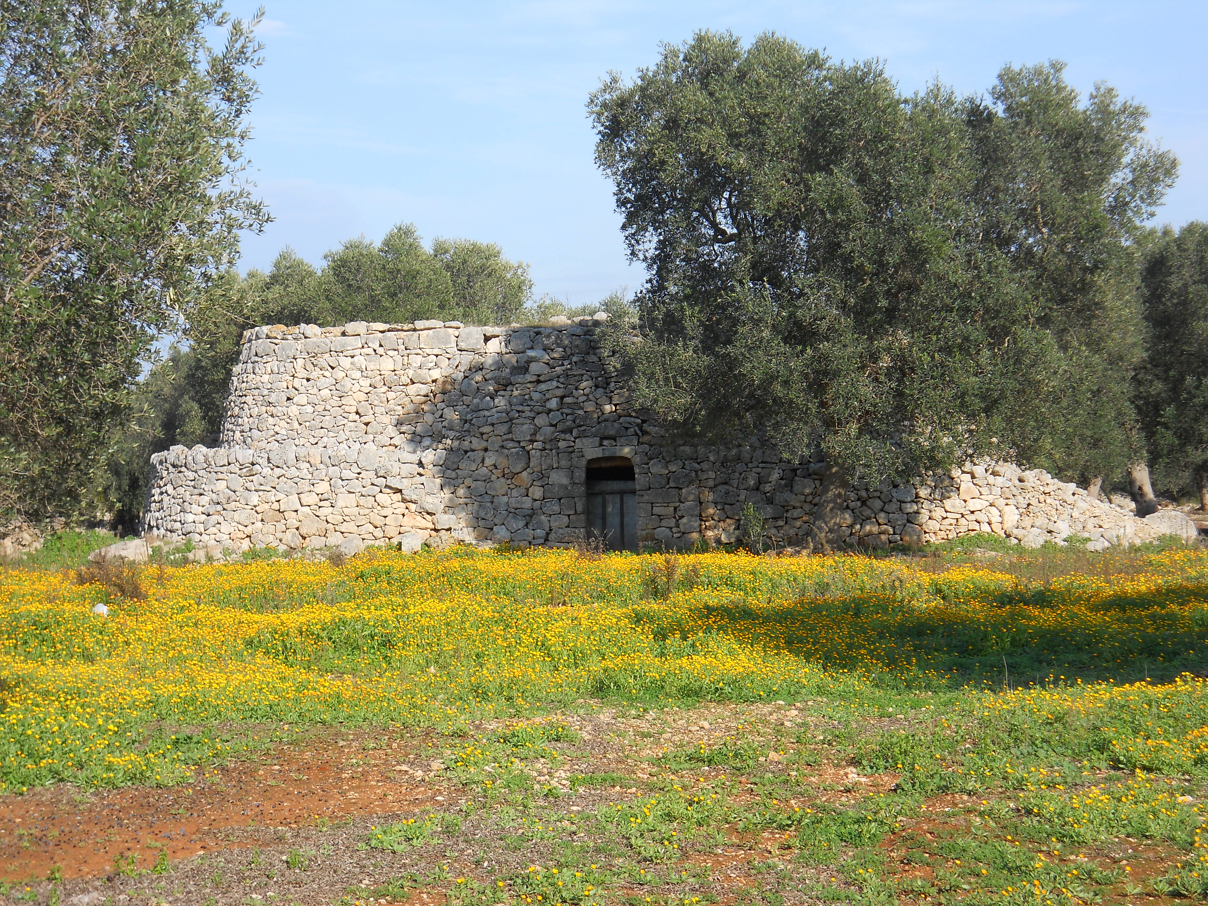 Monumentale "Furnieddhru" nelle vicinanze della Provinciale Copertino-S.Isidoro (LE)